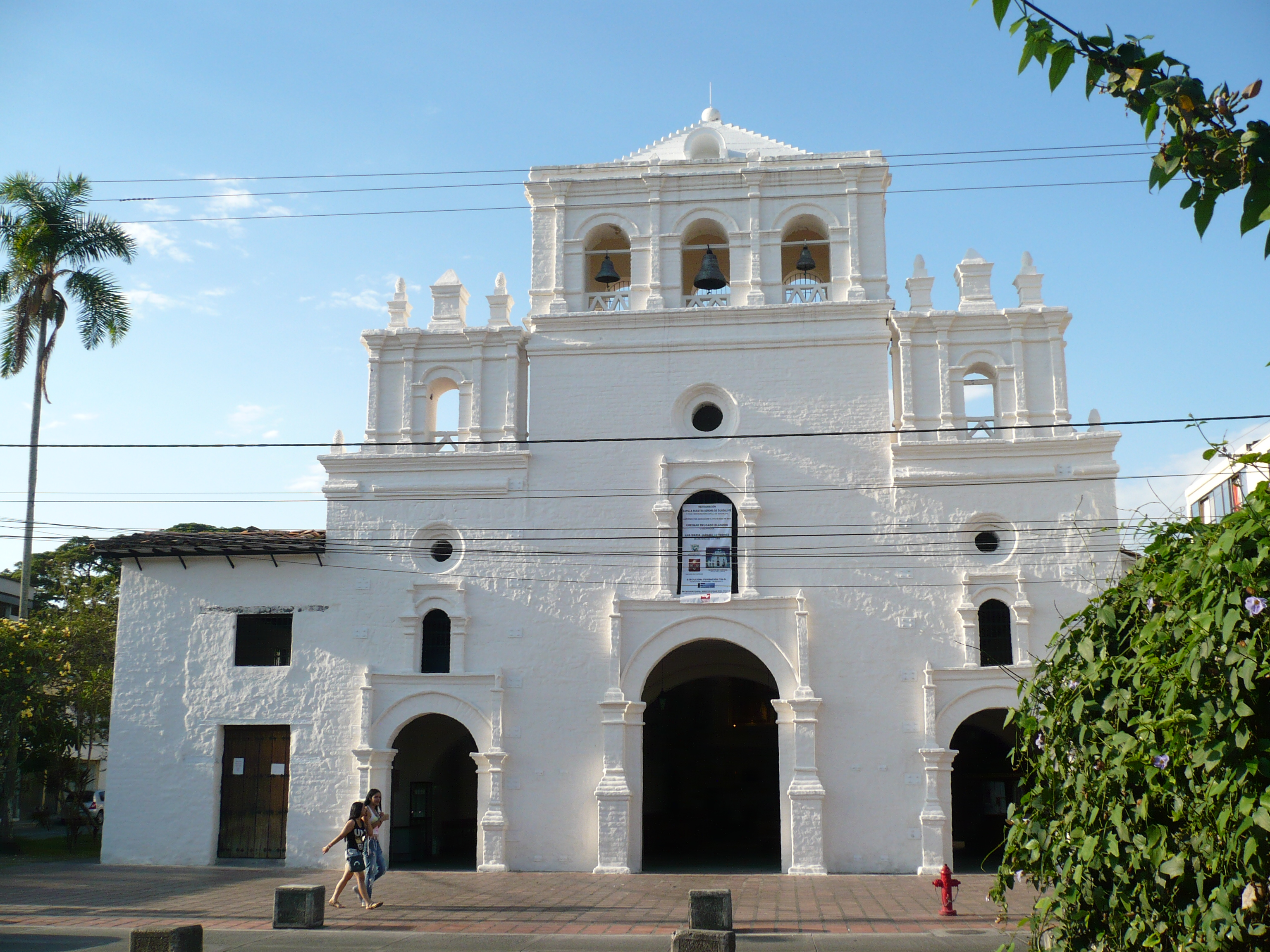 Capilla de Nuestra Señora de Guadalupe Cartago, Valle, Colombia